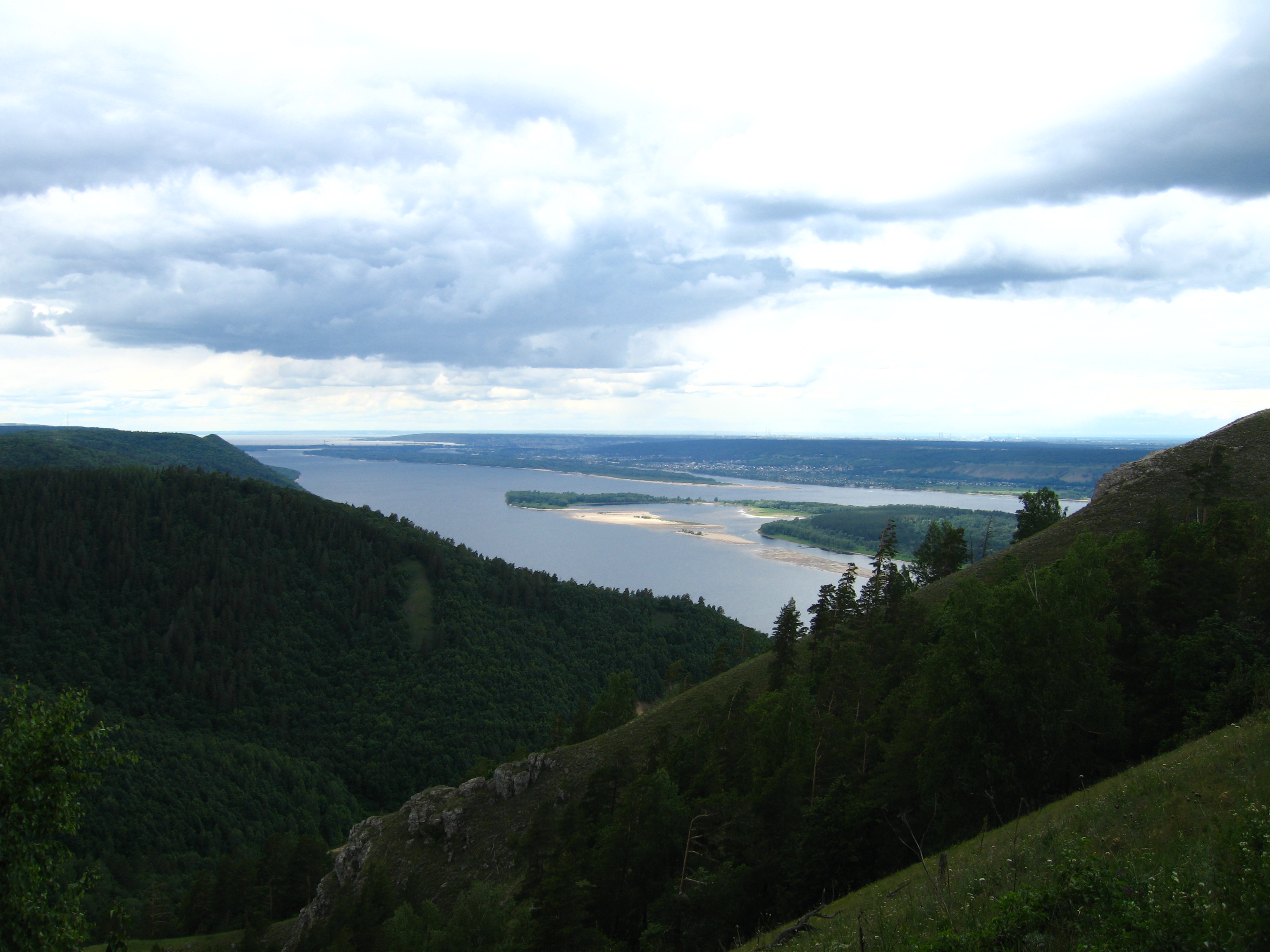 Вид со Стрельной